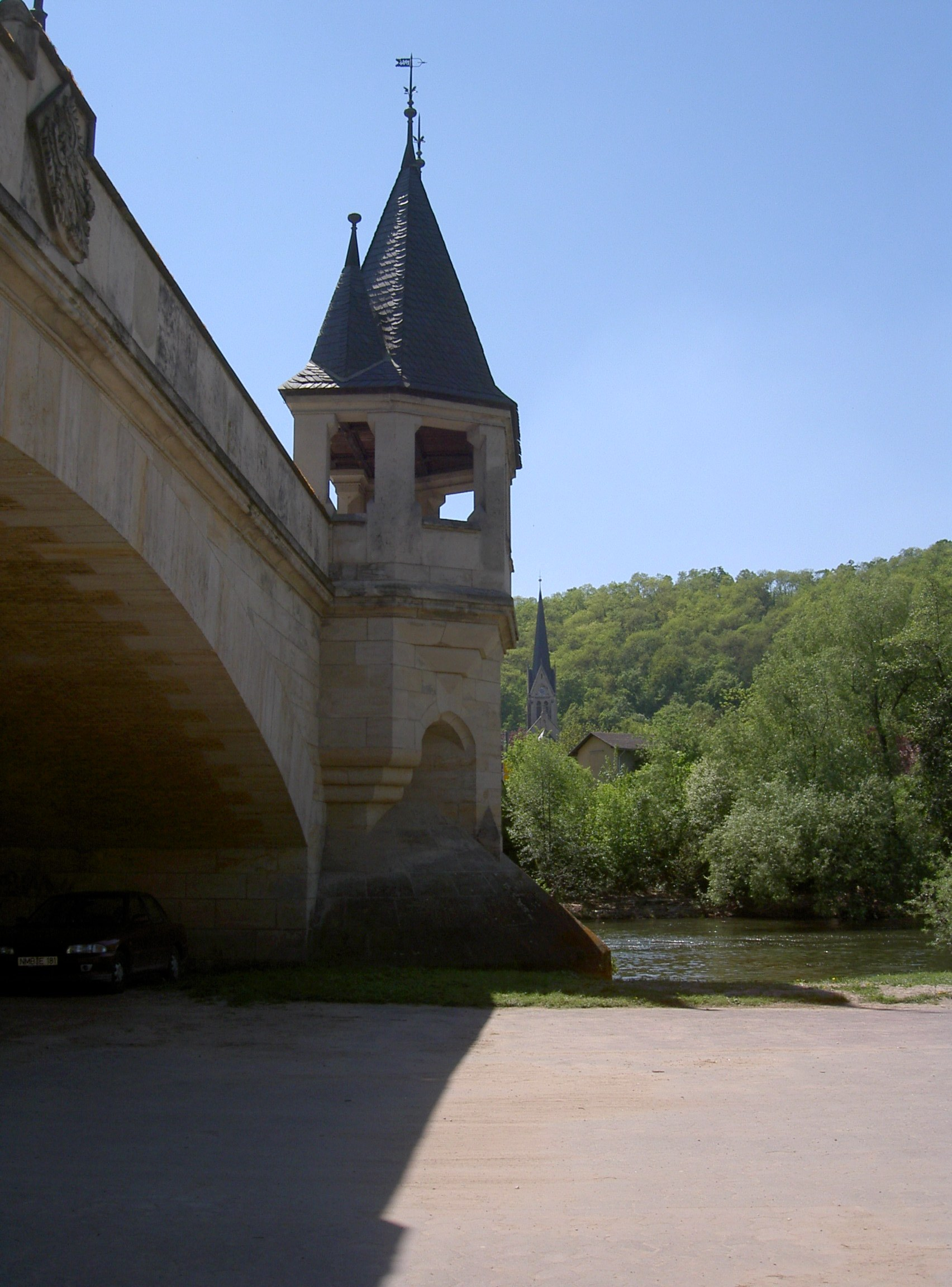 Bad Kösen, Saalebrücke, im Hintergrund Kirche